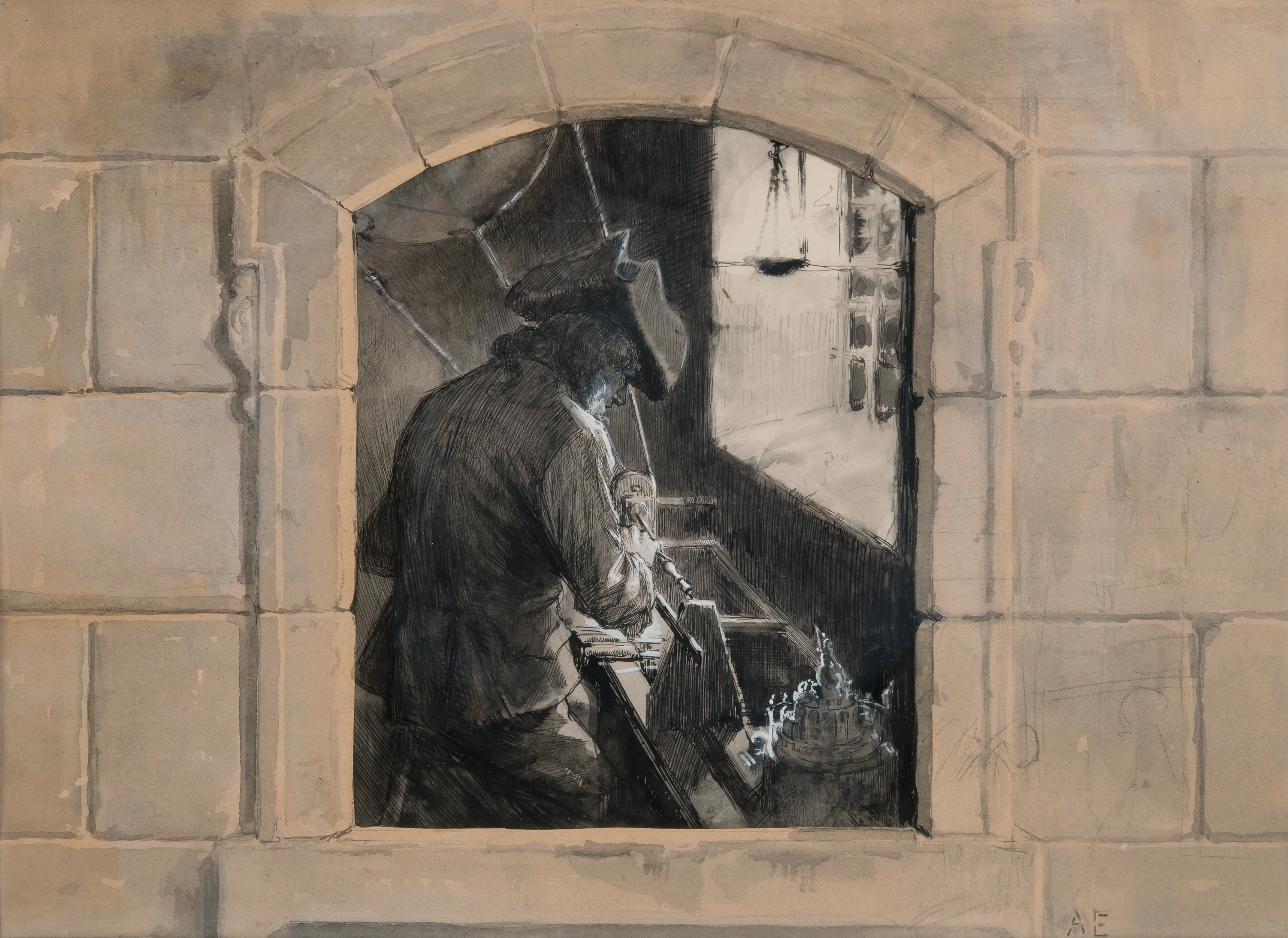 Stenbock vid svarfstolen. ”Fäderneslandet räddare” – fältherren Magnus Stenbock (1664-1717) var sedan 1713 fånge i Fredrikshavns kastell, som ligger norr om Köpenhamn. För att undfly sitt öde i fängelse, där han avled av elände, snider han ett drömslott ur elfenben. Originalillustration av Albert Edelfelt, utförda 1891-1894 till Carl Snoilskys verk Svenska Bilder, Stockholm 1894. Förläggaren Nils Geber lät rama in Edelfelts verk som han lämnat in för tryckning och hängde upp dem i sitt hem till Edelfelts förargelse.